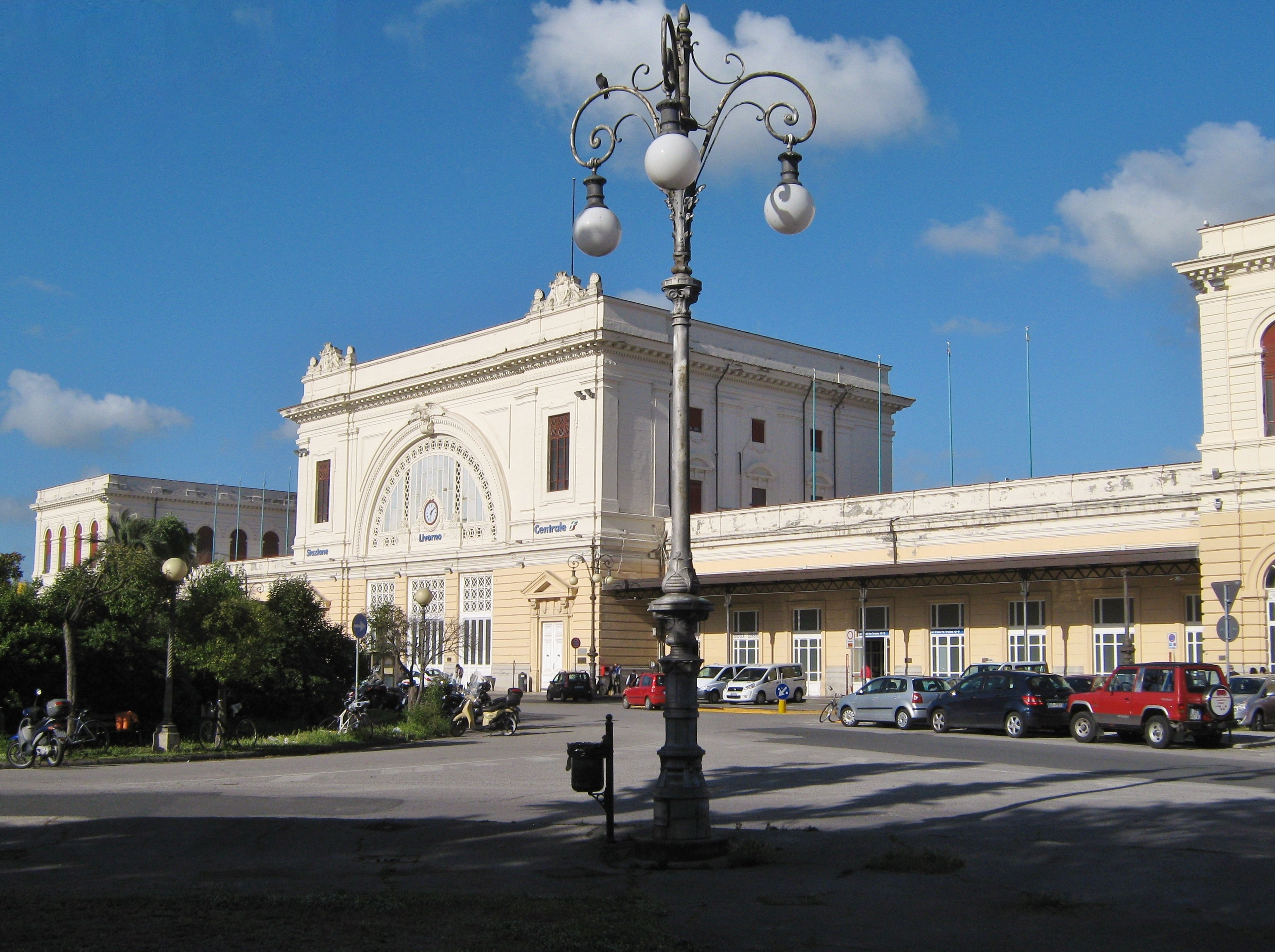 Livorno: l'elegante edificio della Stazione Centrale, sulla linea ferroviaria Pisa-Livorno-Roma